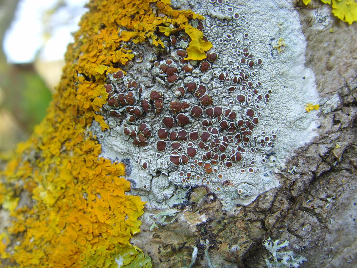 Lecanora argentata, Porz an Ejenn, Goulien, Finistère, Bretagne, France